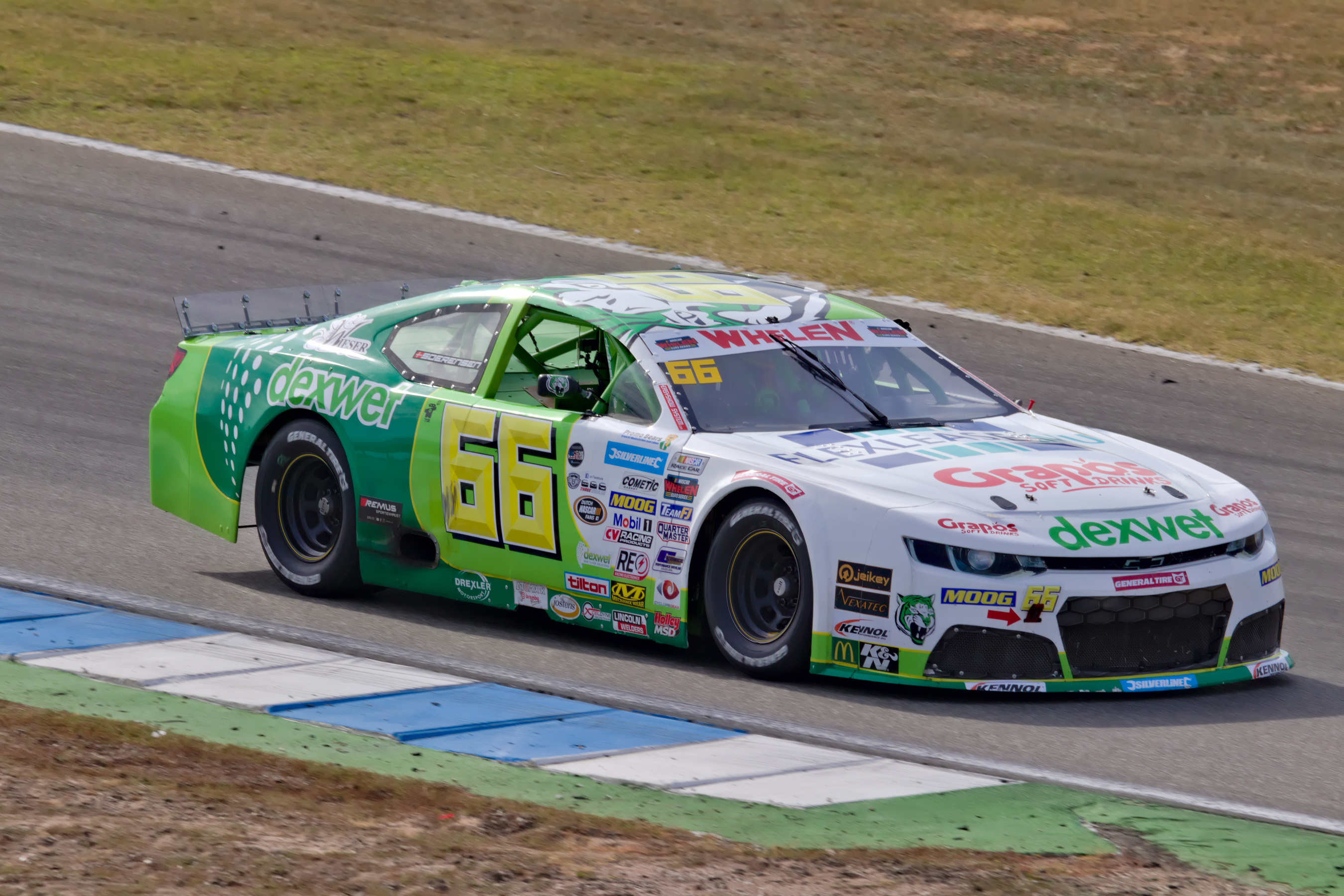 Lasse Soerensen beim zweiten Rennen der Elite 2 in Hockenheim 2019.